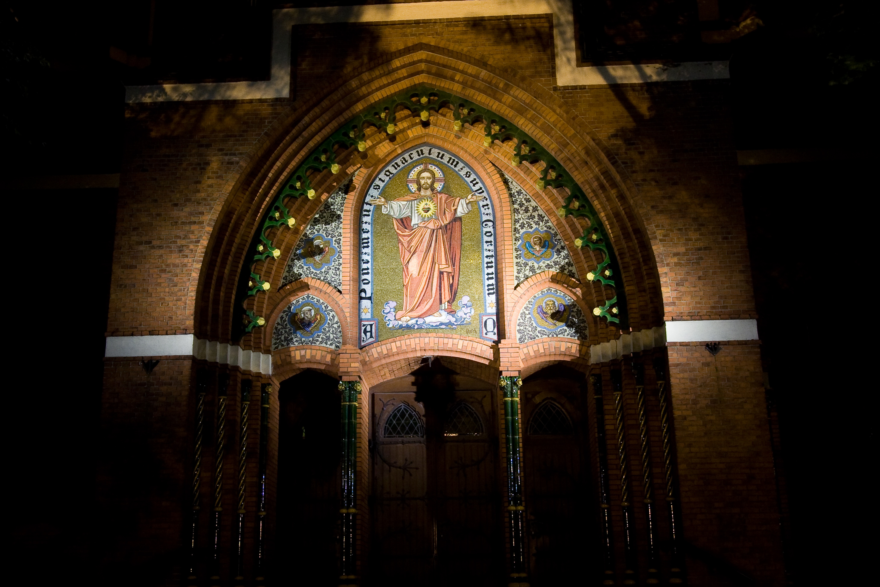 Supraporta nad drzwiami kościoła NSPJ w Olsztynie